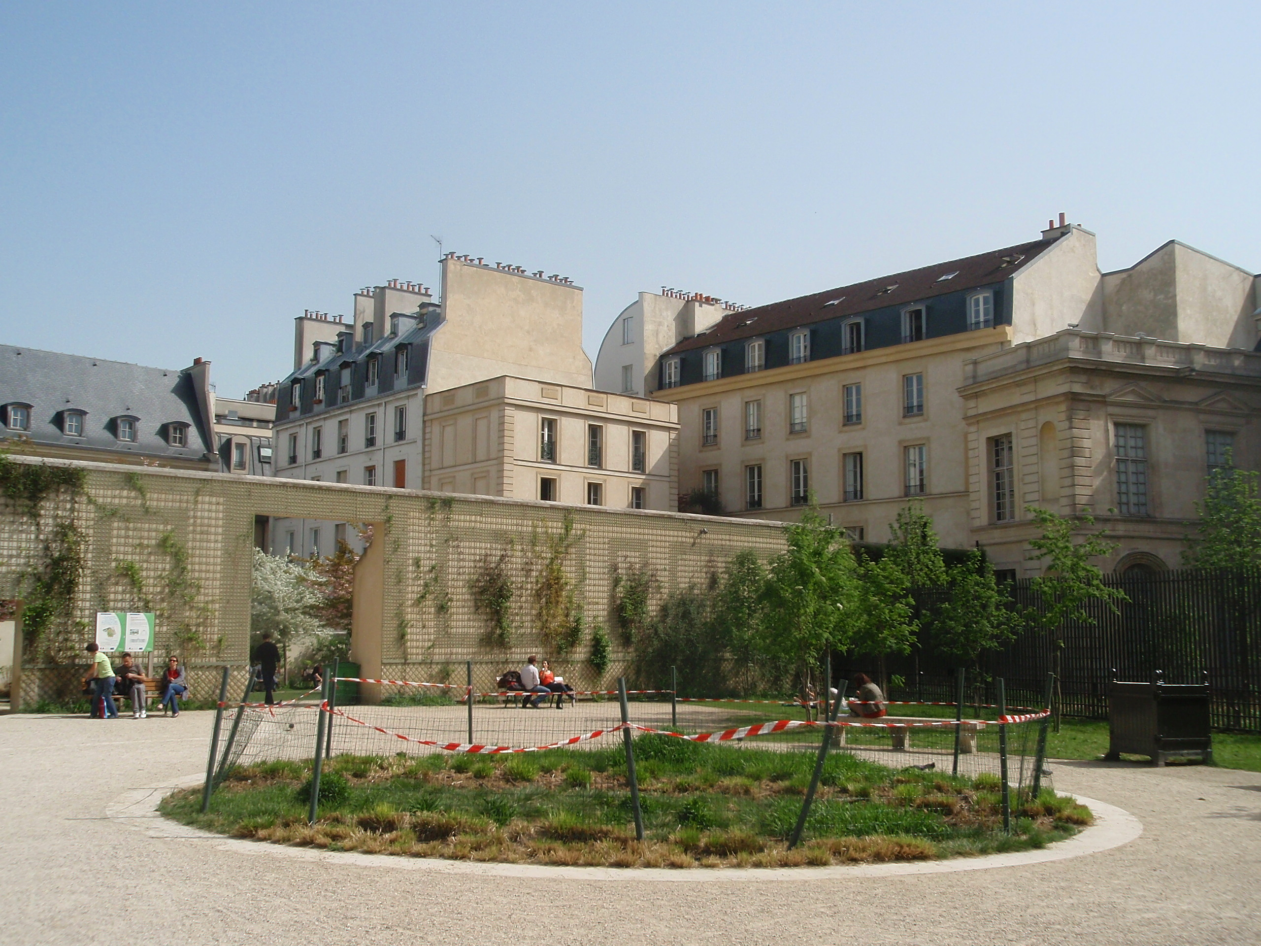 Jardin Anne-Frank